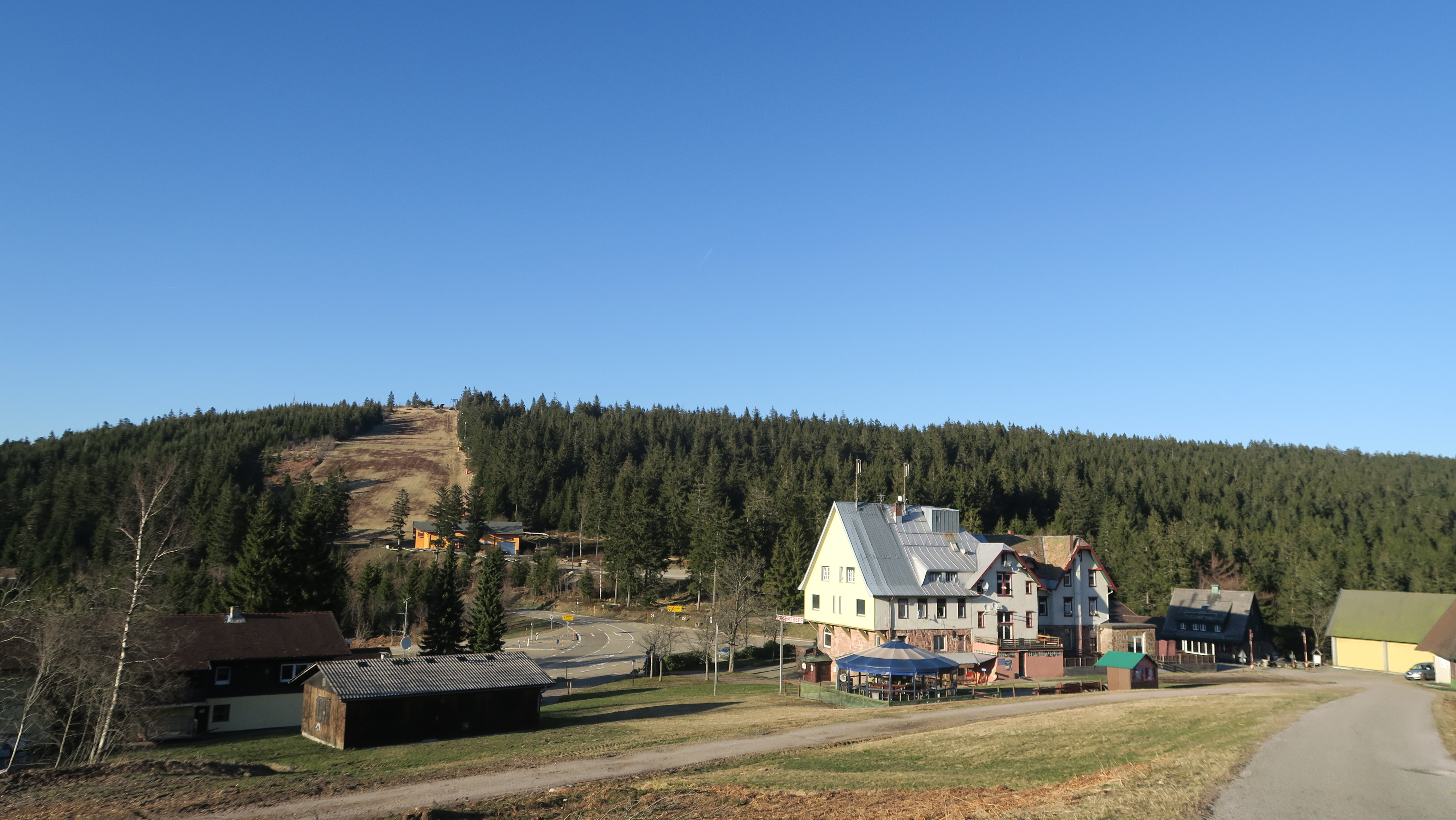 Das Höhenhotel Unterstmatt von 1905